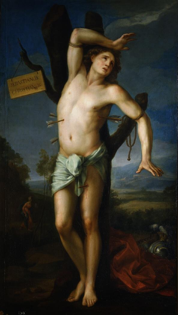 La obra representa el martirio de San Sebastián.